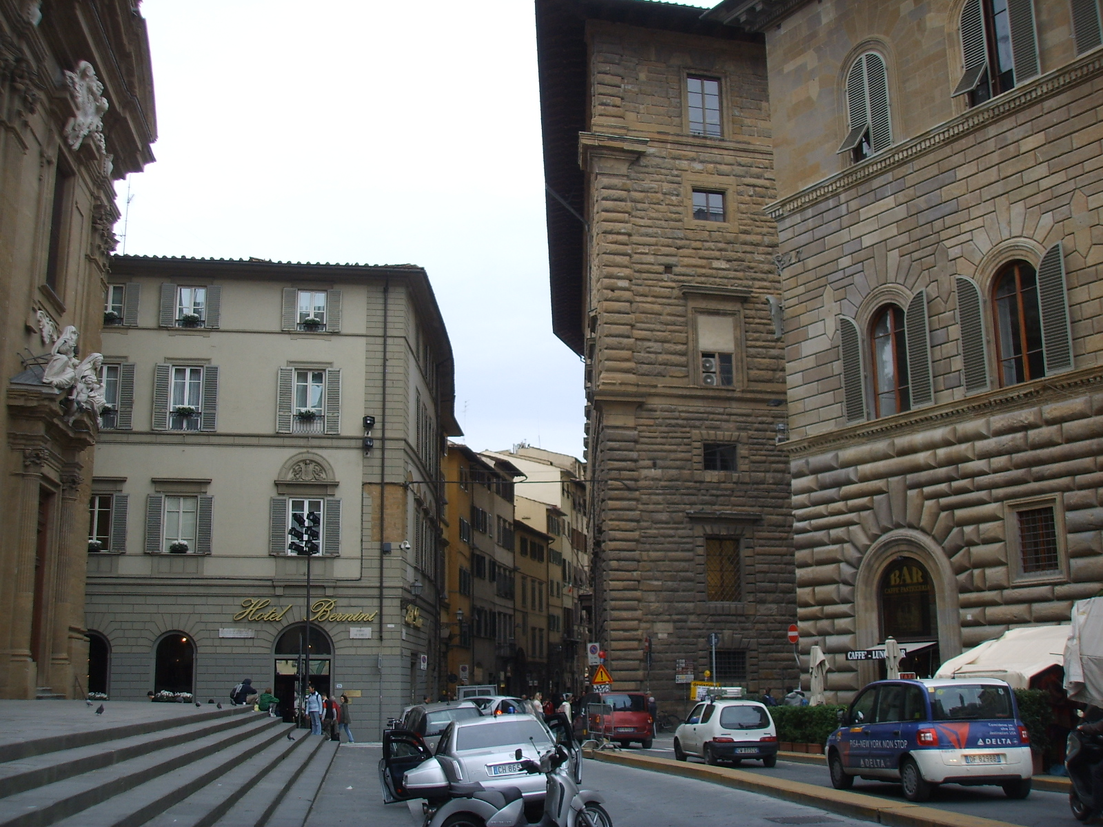 Piazza san firenze, palazzi di san firenze, columbia-parlamento, vecchio e gondi